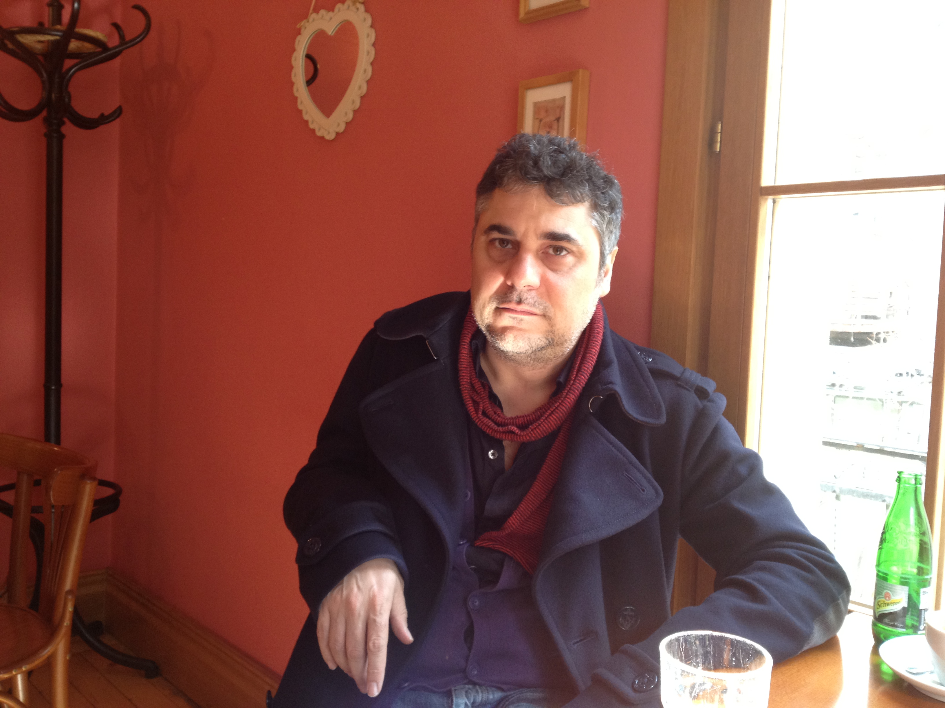 Алек Попов - писател